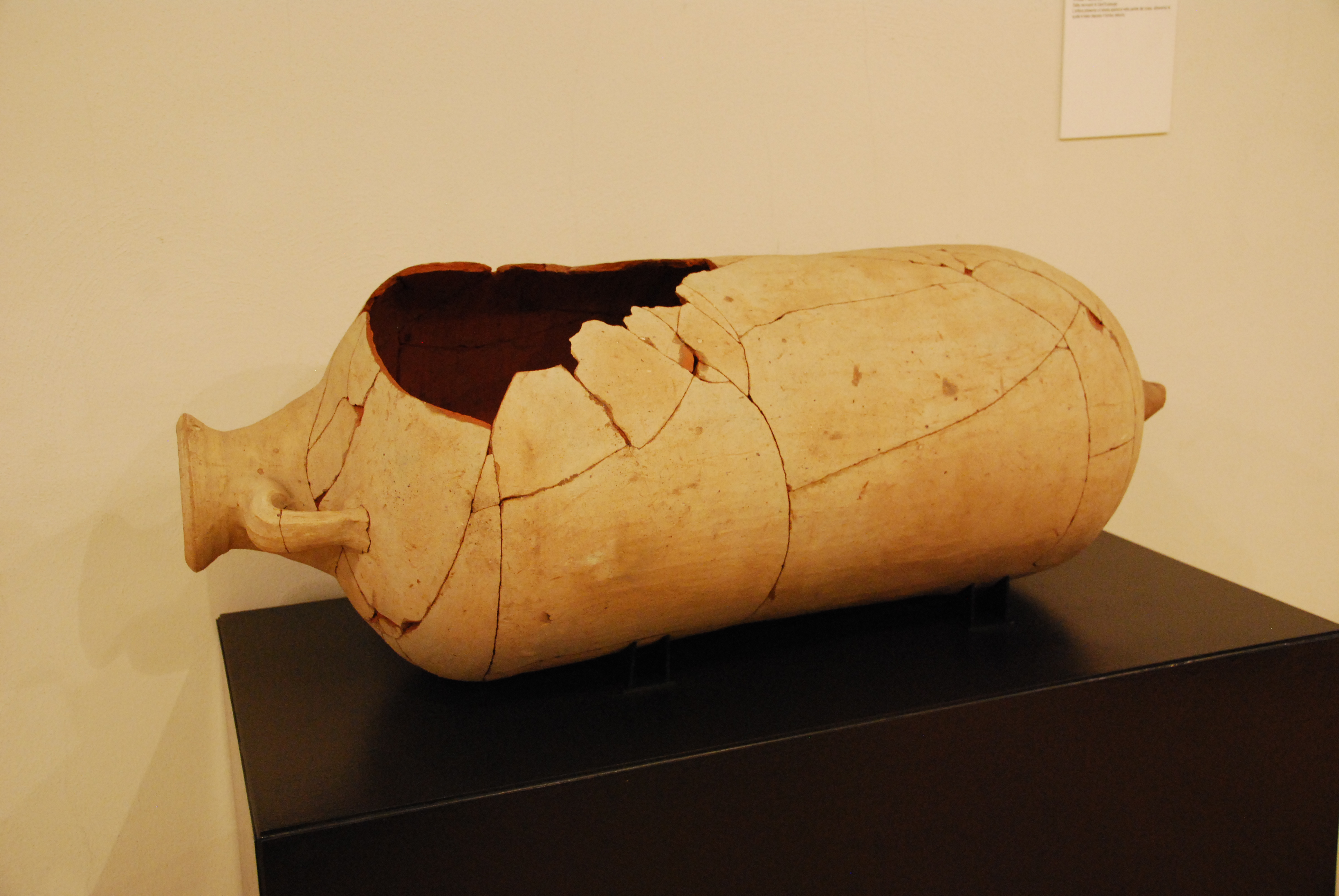 Antiquarium “Alda Levi” - MIBAC,Anfora utilizzata per la sepoltura di un bambino. This is a photo of a monument which is part of cultural heritage of Italy.